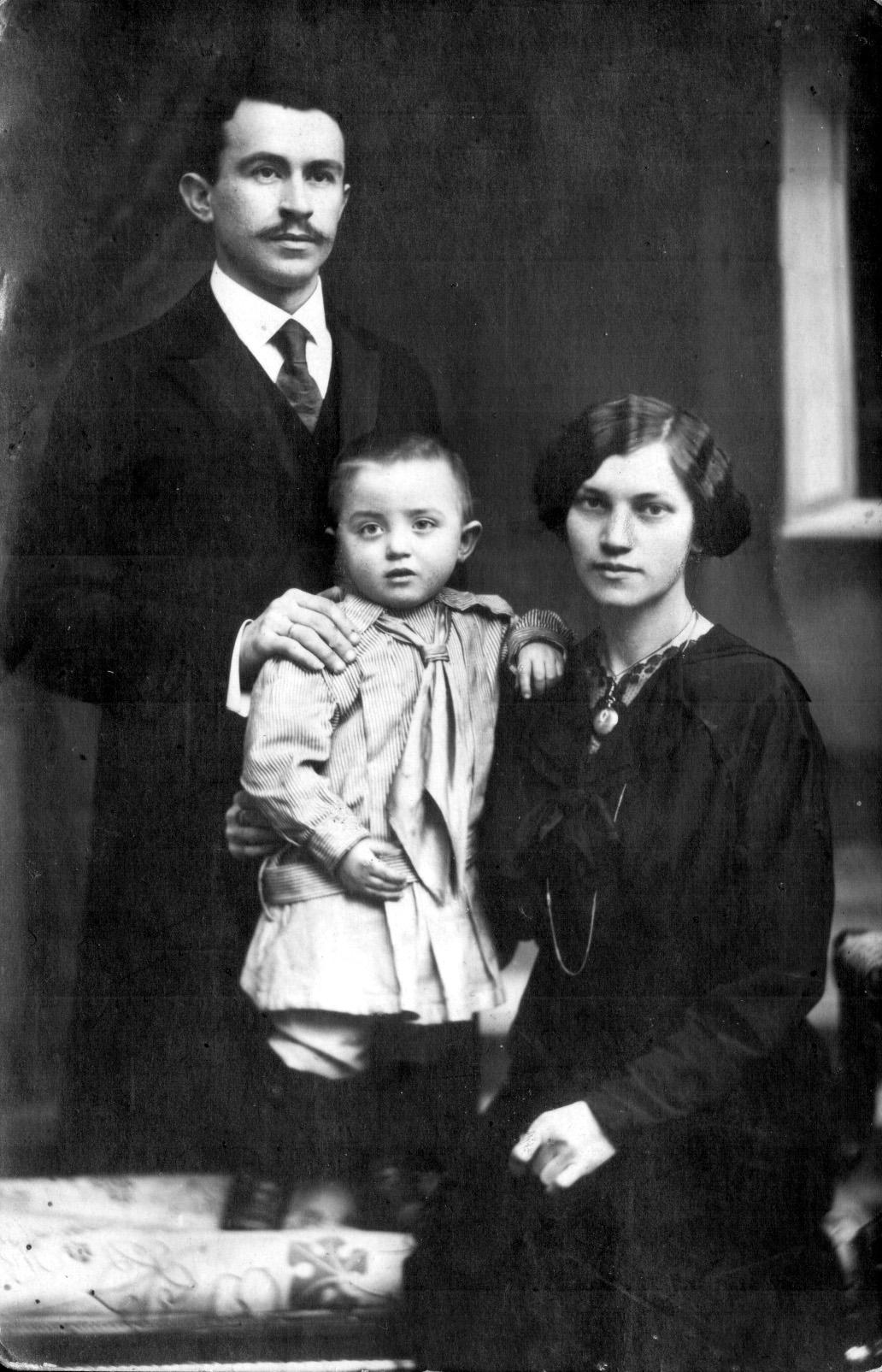 Потомственный дворянин Левковский Александр Иосифович с семьёй